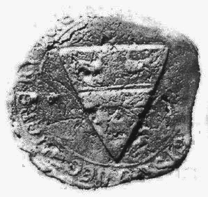 Budmér nb. Miklós asztalnokmester pecsétje, 1255